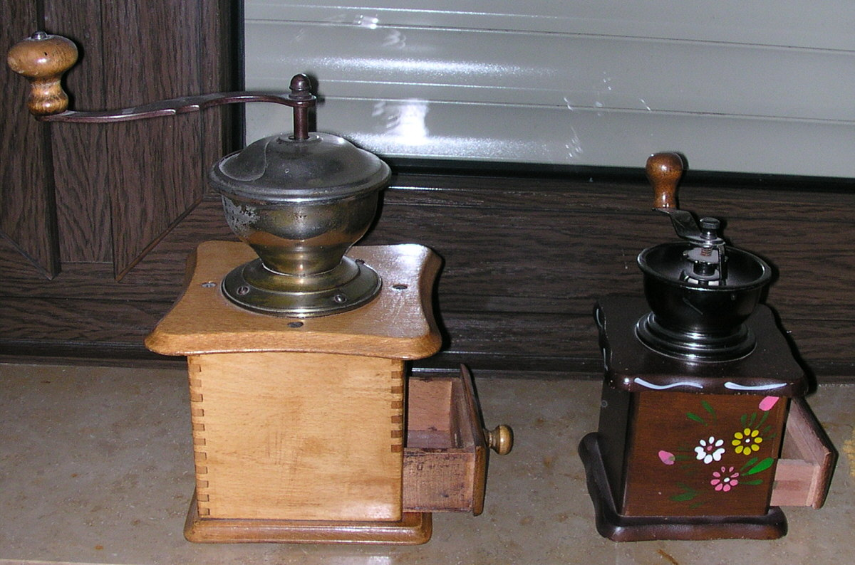 Zwei handbetriebene Kaffeemühlen, Korpus aus Holz, Mahlwerk aus Eisen